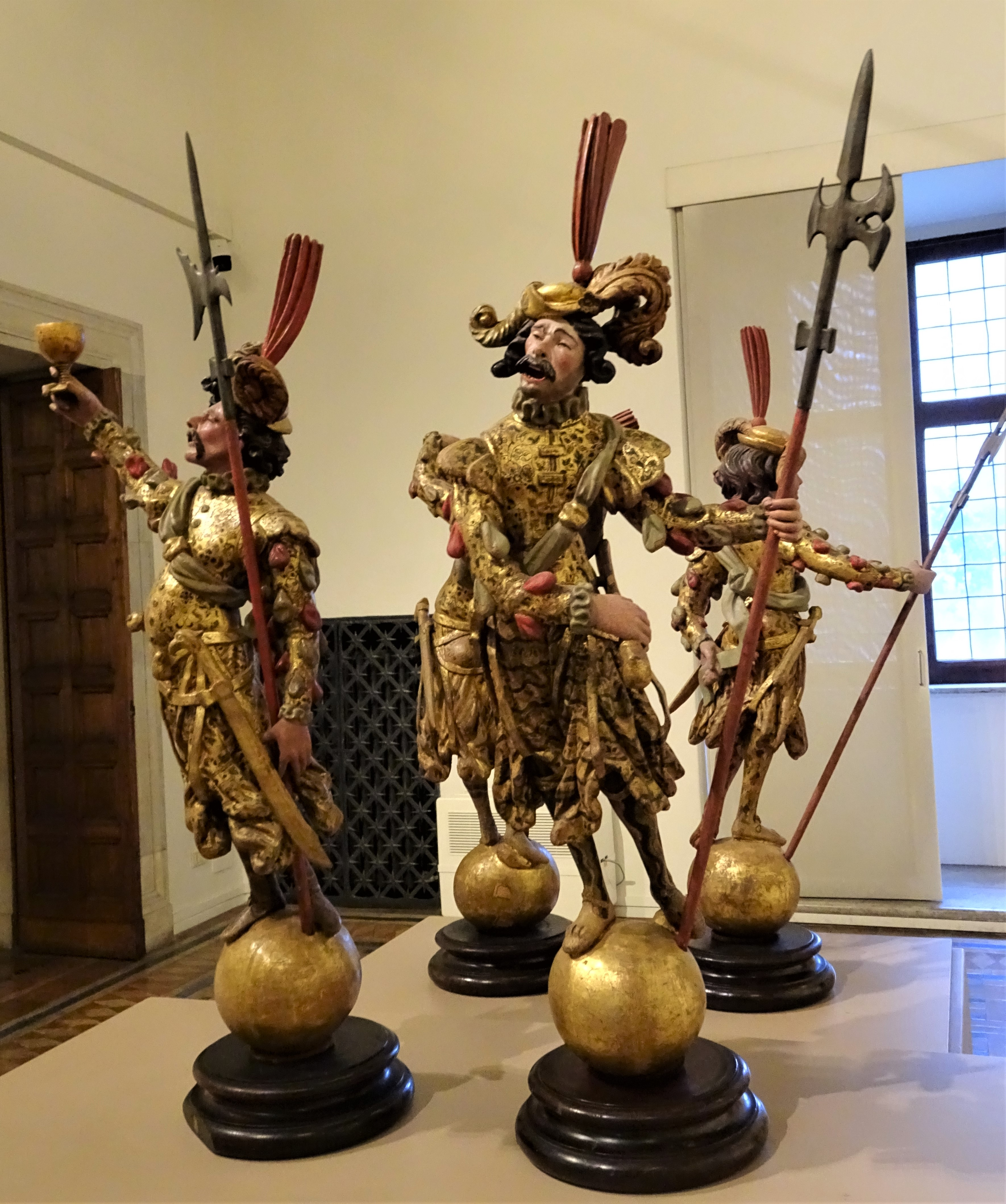 lansknechten. Beschilderd houtsnijwerk uit Zuid-Duitsland, 2e helft van de 16e eeuw. Museo del Palazzo Venezia, Rome.